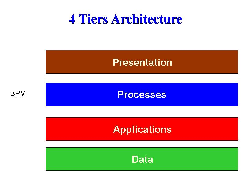 איור זה מציג ארכיטקטורת מיחשוב של ארבע שכבות